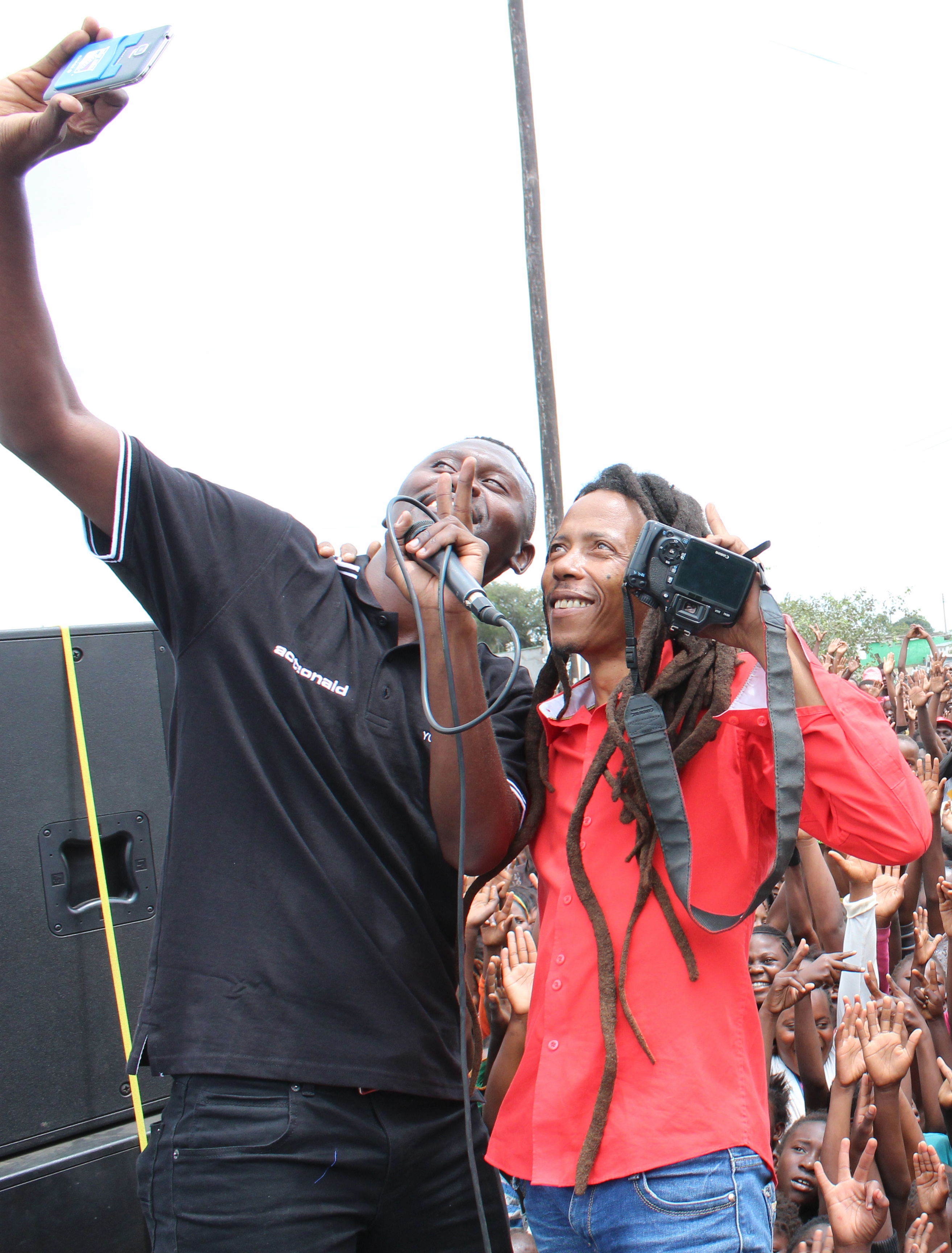 Chi-Chewa: Maiko Zulu ndi B'Flow